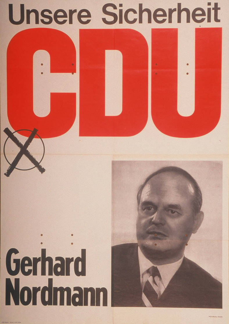 Unsere Sicherheit CDU Gerhard Nordmann Abbildung: Porträtfoto - Stimmkreuz Kommentar: Kandidat aus Hagen ? Plakatart: Kandidaten-/Personenplakat mit Porträt Auftraggeber: CDU Bonn Drucker_Druckart_Druckort: KVD Köln; Pick-Druck, Hagen Objekt-Signatur: 10-001: 1217 Bestand: Plakate zu Bundestagswahlen (10-001) GliederungBestand10-18: Plakate zu Bundestagswahlen (10-001) » Die 5. Bundestagswahl am 19. September 1965 » CDU » Mit Porträtfoto Lizenz: KAS/ACDP 10-001: 1217 CC-BY-SA 3.0 DE